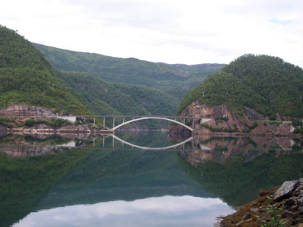 Trengsel bru.